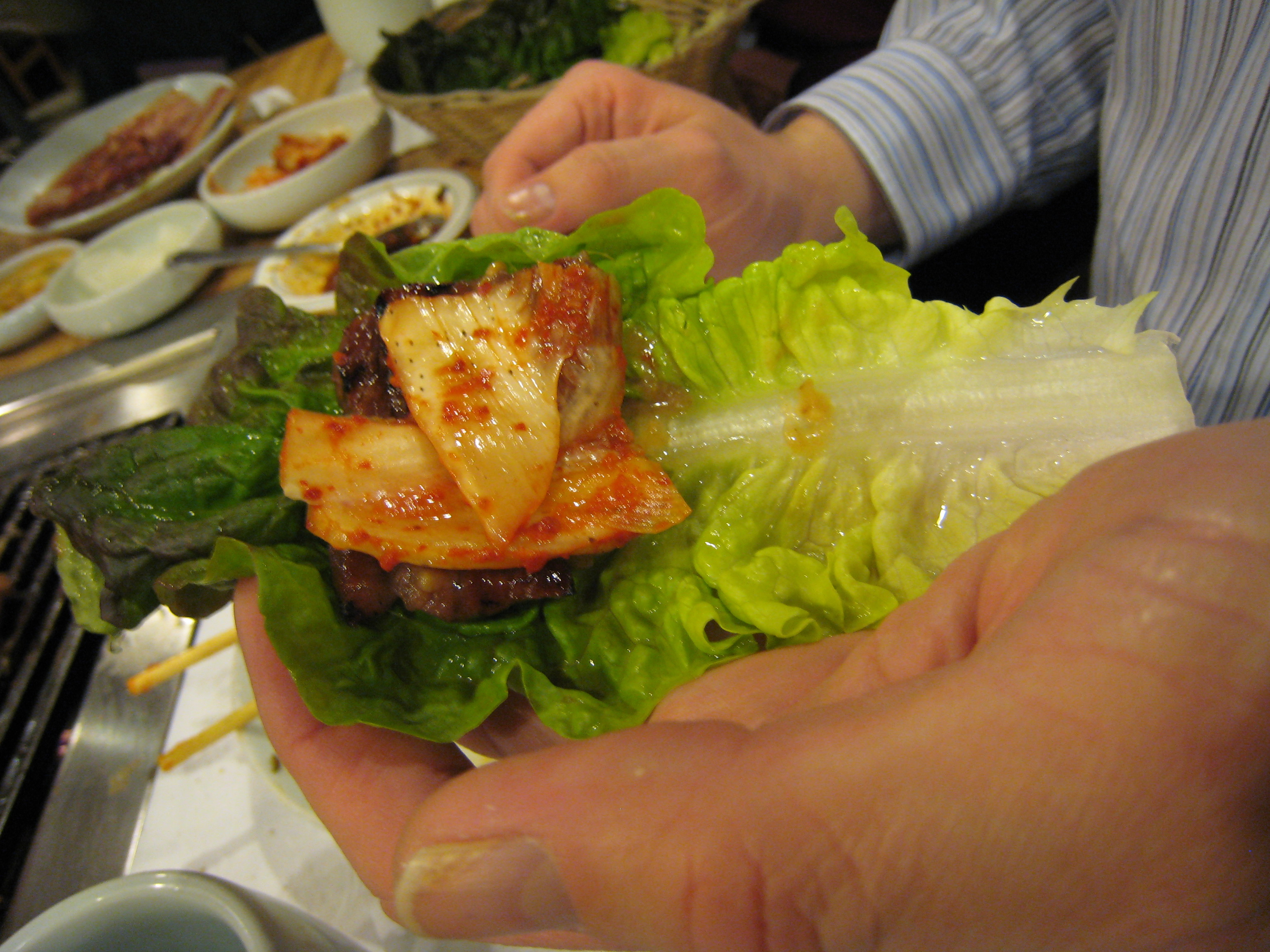 Galbi, Korean barbeque rib